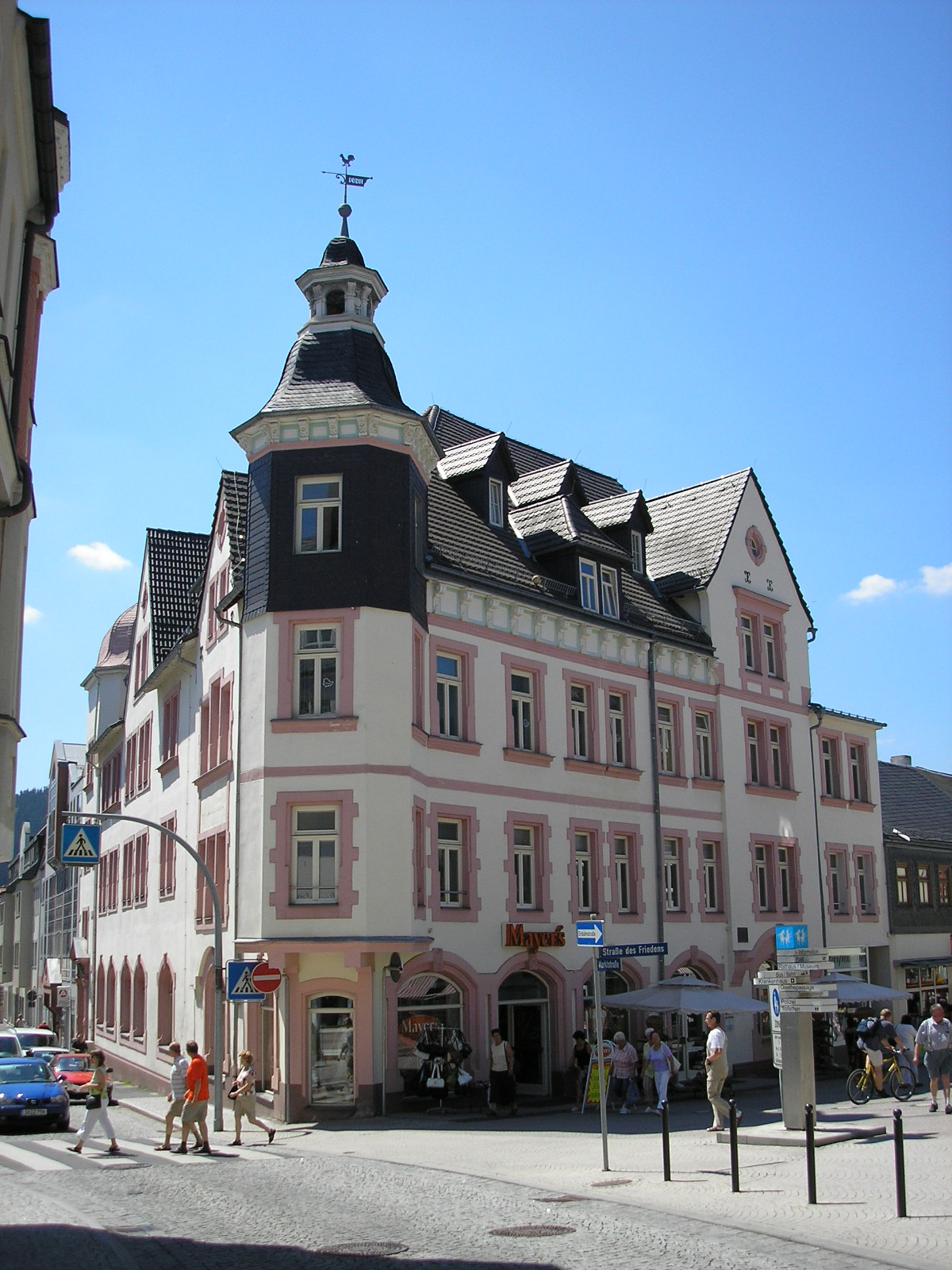 Der Sächsische Hof in Ilmenau (Thüringen)